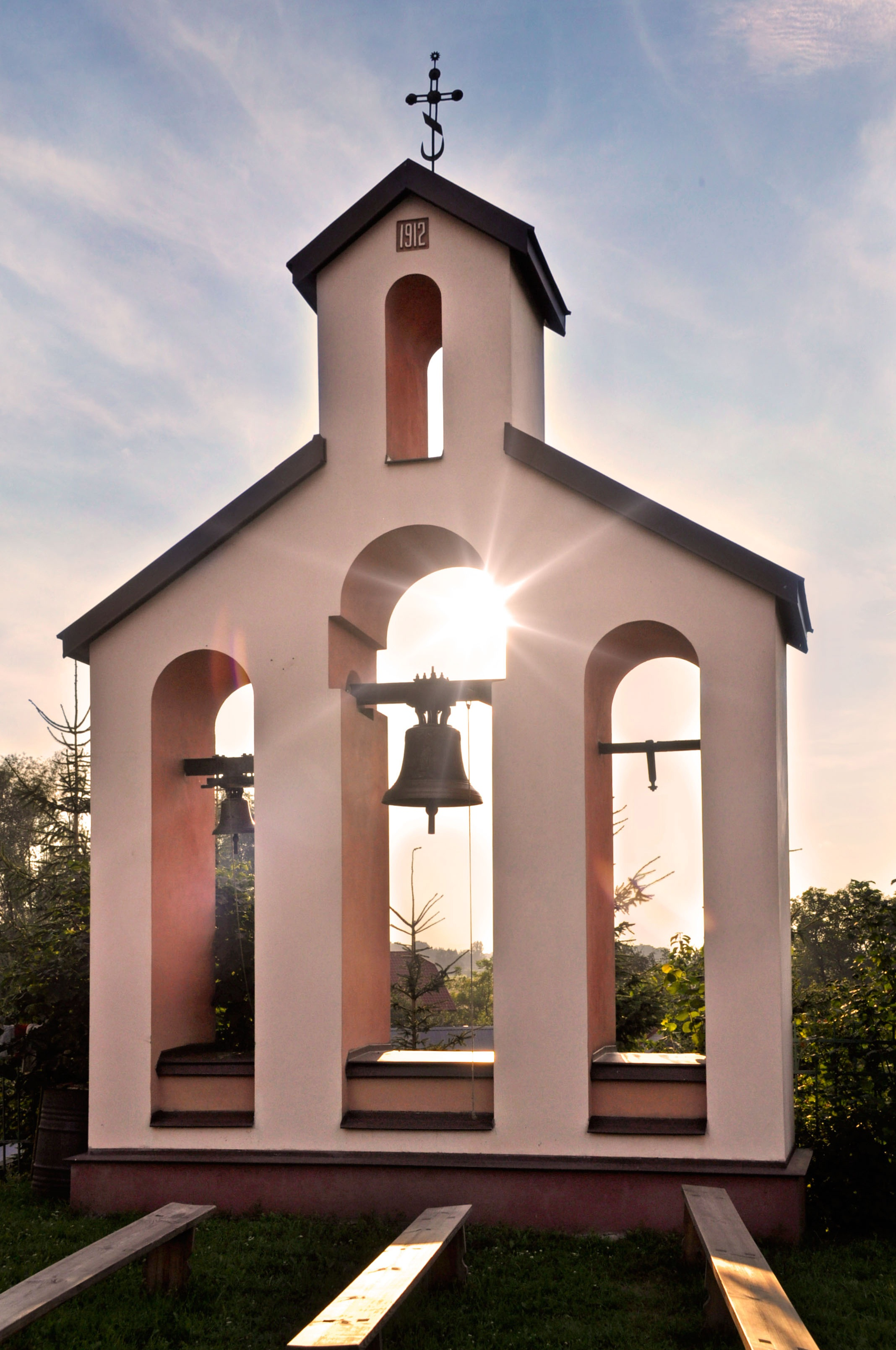 Kuryłówka - zespół dawnej cerkwi greckokatolickiej, obecnie kościół rzymskokatolicki filialny pw. św. Mikołaja: dzwonnica (zabytek nr A-148 z 28.02.2006)